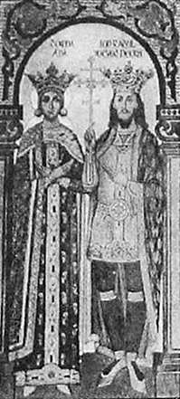 Radu I and Doamna Ana